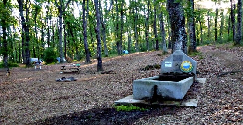 Area picnic della "Cerratina" realizzata dal Parco Naturale Regionale di Bracciano - Martignano, 1 settembre 2012